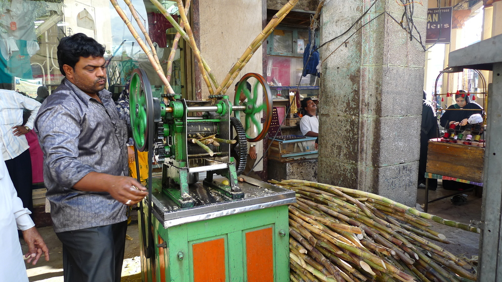 Sugarcane juice vendor in Hyderabad